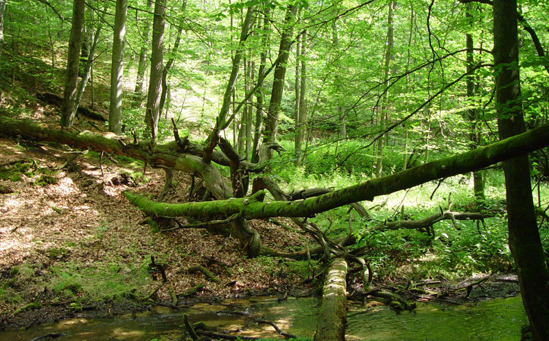 Diabli Skok (Rezerwat koło wsi Szwecji (województwo zachodniopomorskie)